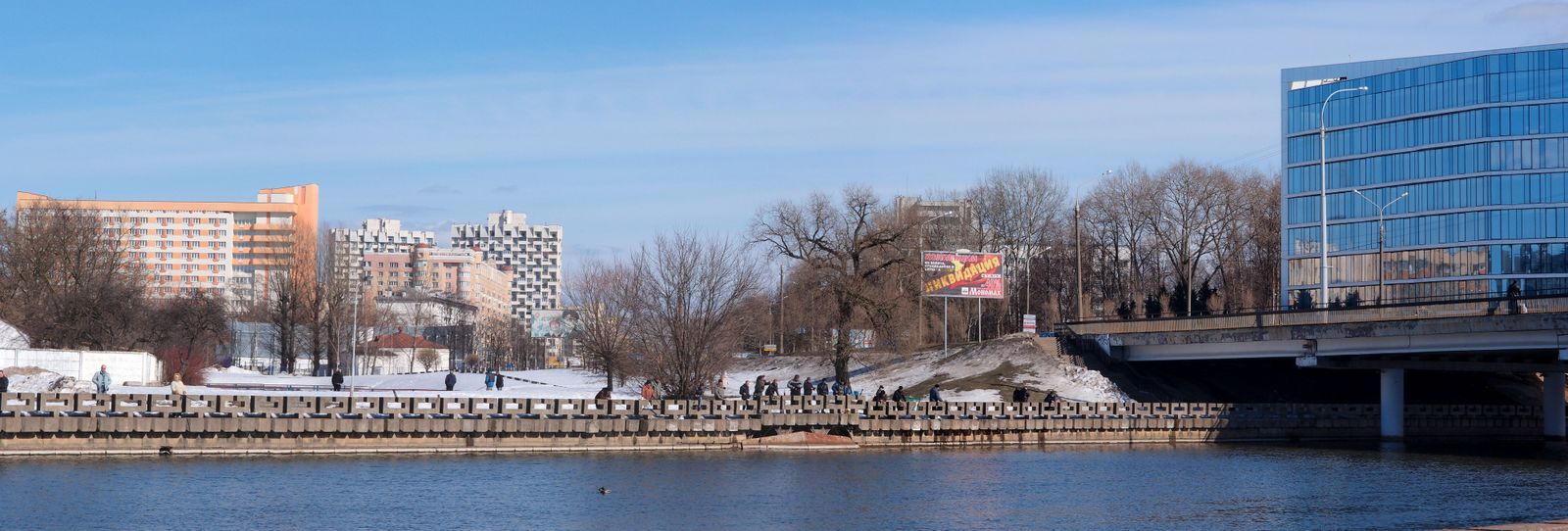 Staražoŭka. Старажоўка